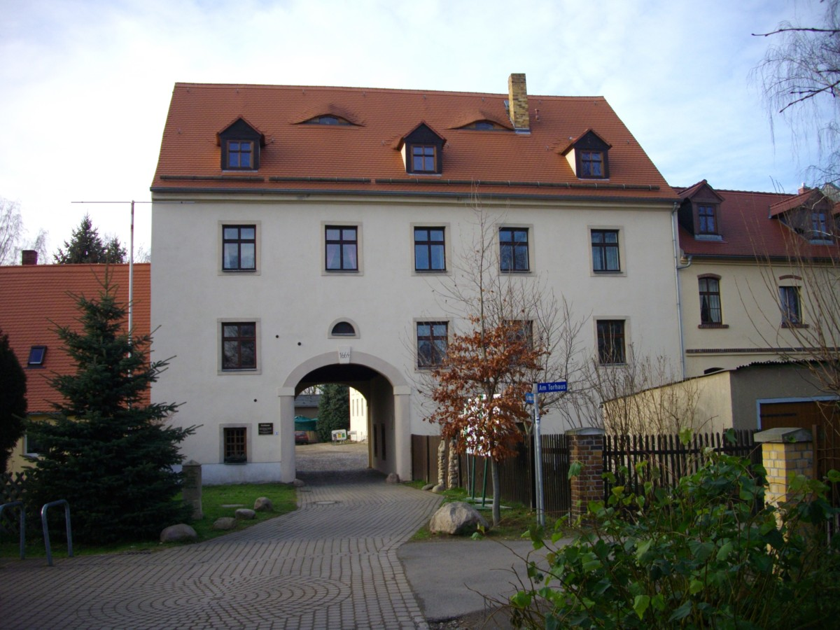 Torhaus Markkleeberg bei Leipzig